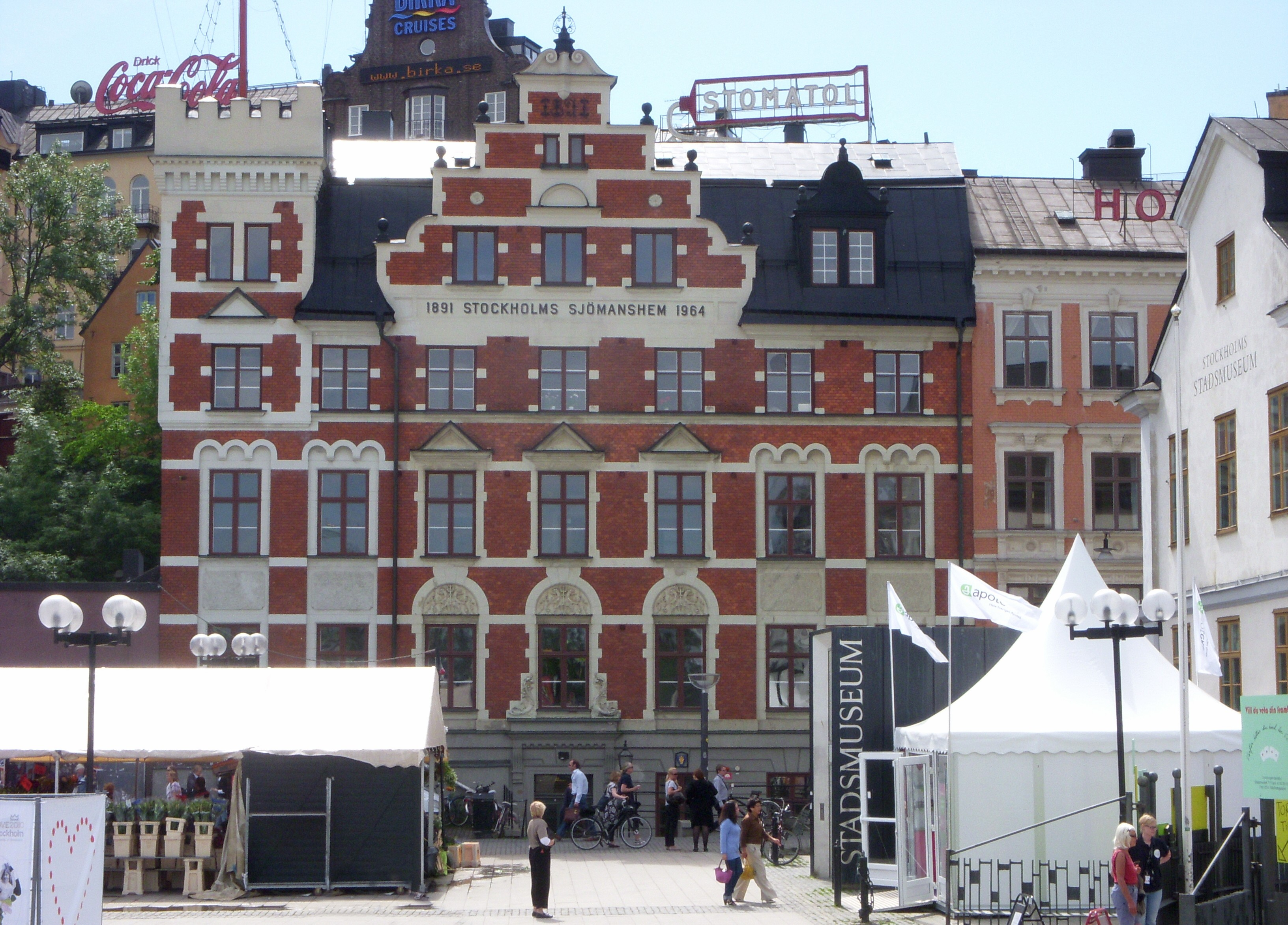 Stockholms sjömanshem, Södermalm, Peder Myndes backe 3